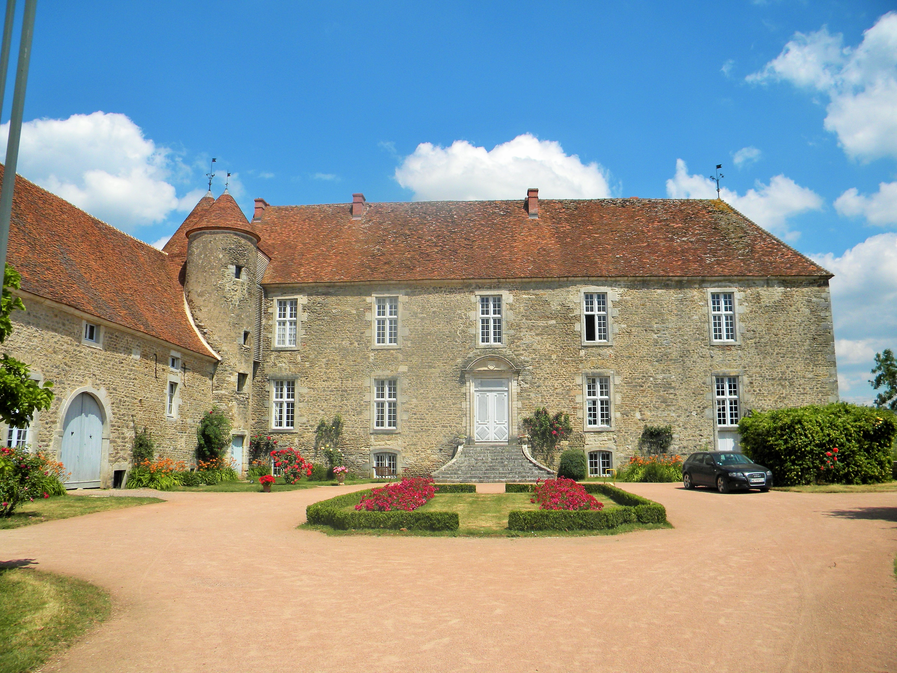 Kastelo de Écutigny